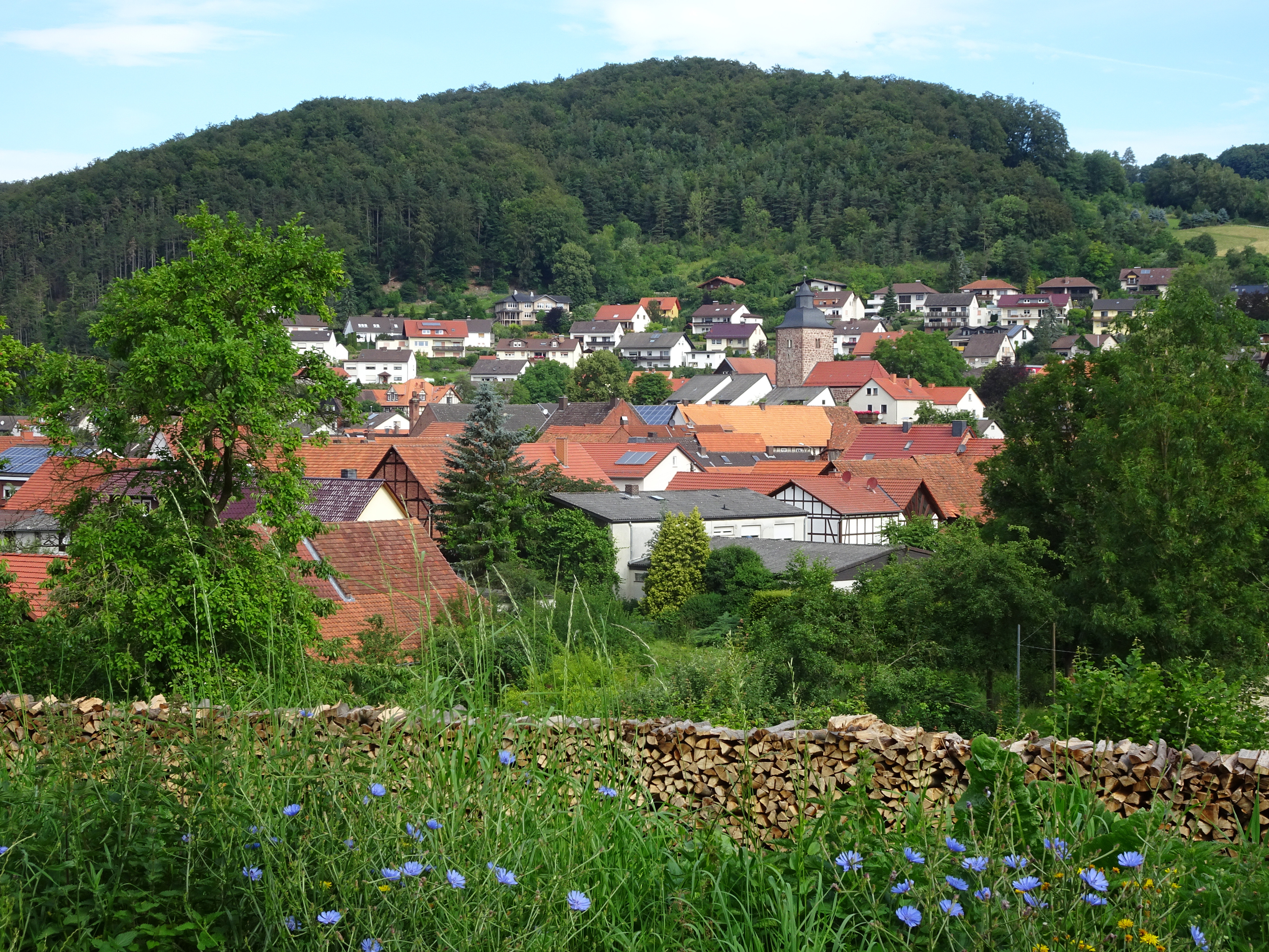 Ringgau- Datterode im nordhessischen Werra-Meißner-Kreis. Blick vom Herkules-Wartburg-Radweg auf den Ortskern mit der Kirche. "Die an erhöhter Stelle im ursprünglichen Ortszentrum errichtete romanische Kirche wurde in der Spätgotik sowie im 18. Jahrhundert mehrmals umgebaut. Das äußere Erscheinungsbild des Baues wird durch den hohen Westturm geprägt, der das Schiff weit sichtbar überragt." Als Kulturdenkmal gilt die Kirche aus künstlerischen, geschichtlichen, wissenschaftlichen und baulichen Gründen. Text aus: Denkmaltopographie Bundesrepublik Deutschland, Kulturdenkmäler in Hessen. Werra-Meißner-Kreis I, Altkreis Eschwege. Peer Zietz, Thomas Wiegand, Braunschweig: Vieweg Verlag, 1991, ISBN 3-528-06240-1.